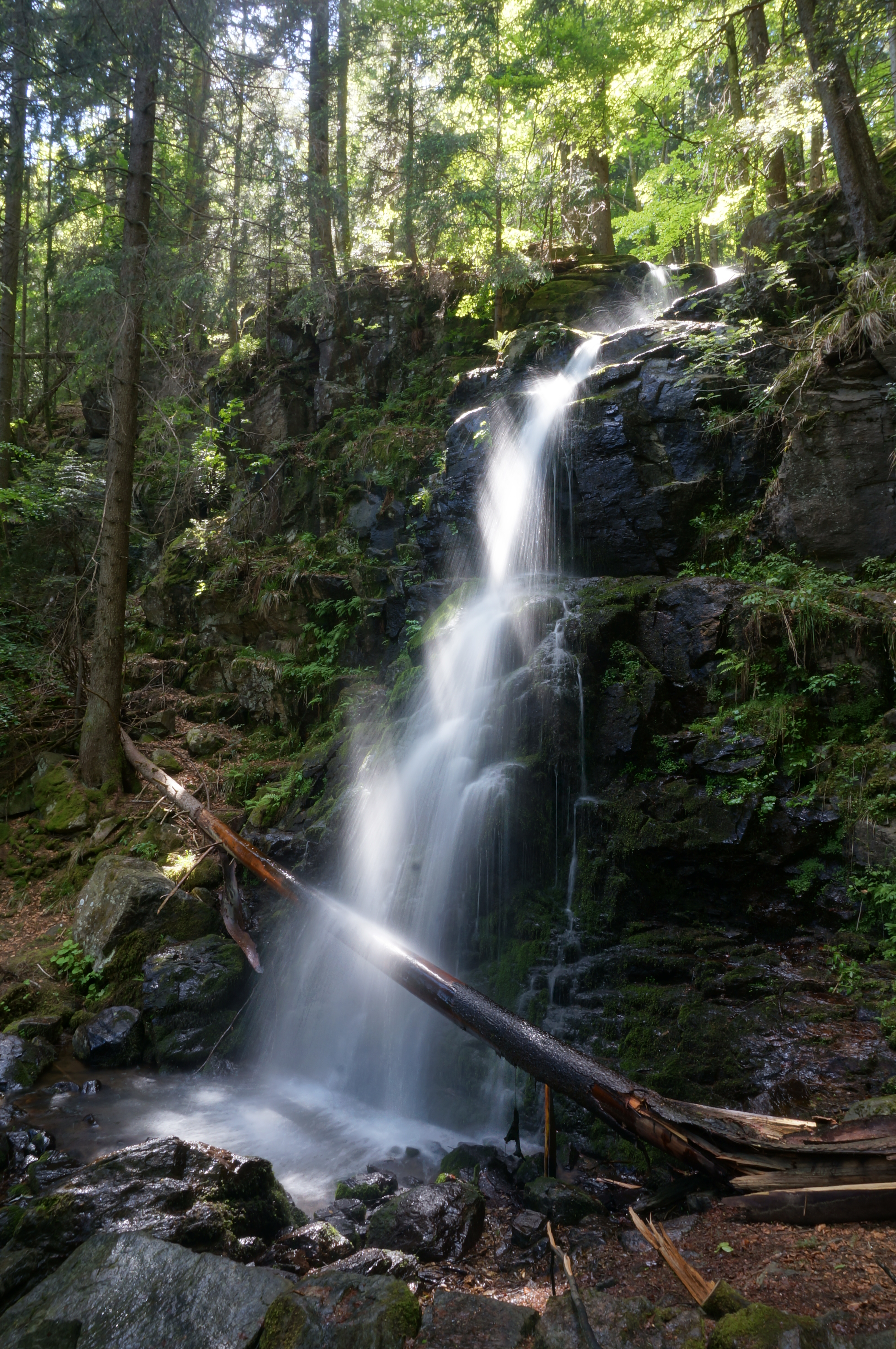 obere Zweribachfälle nachmittags